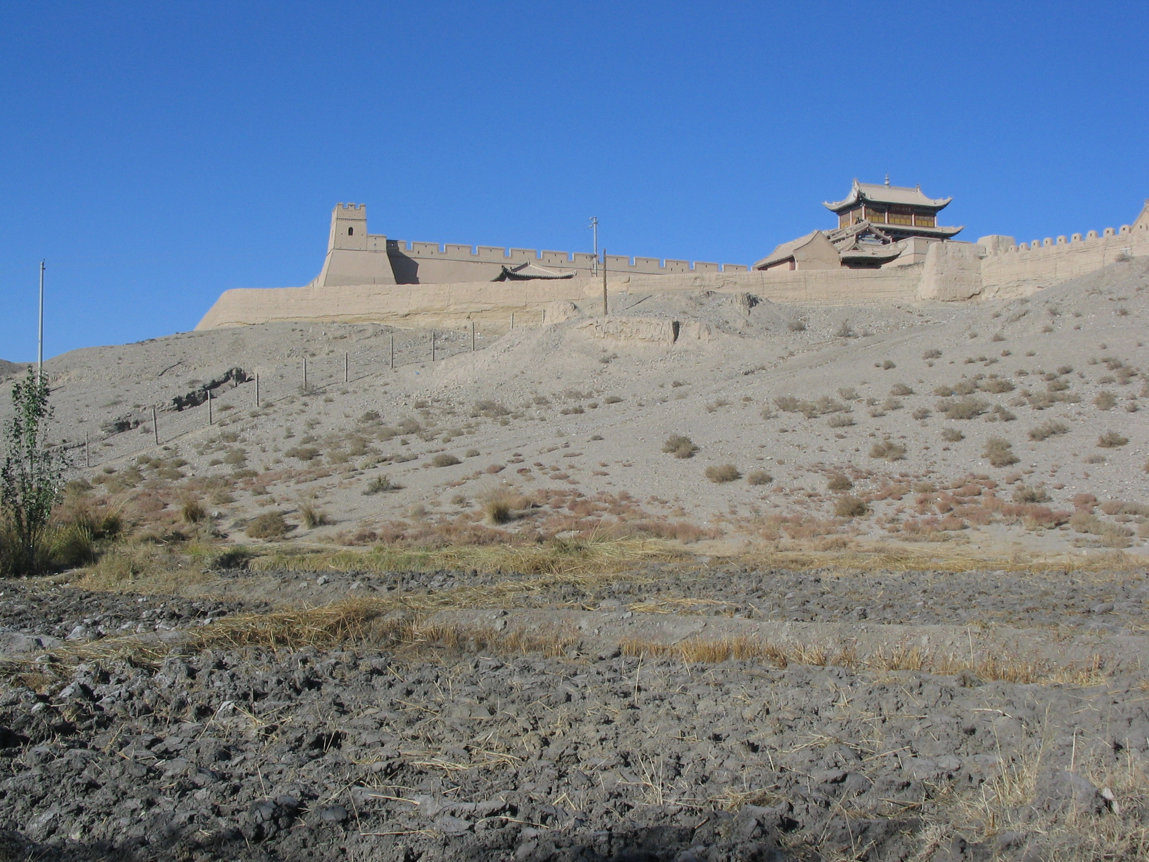 Viaggio in Cina - novembre 2005